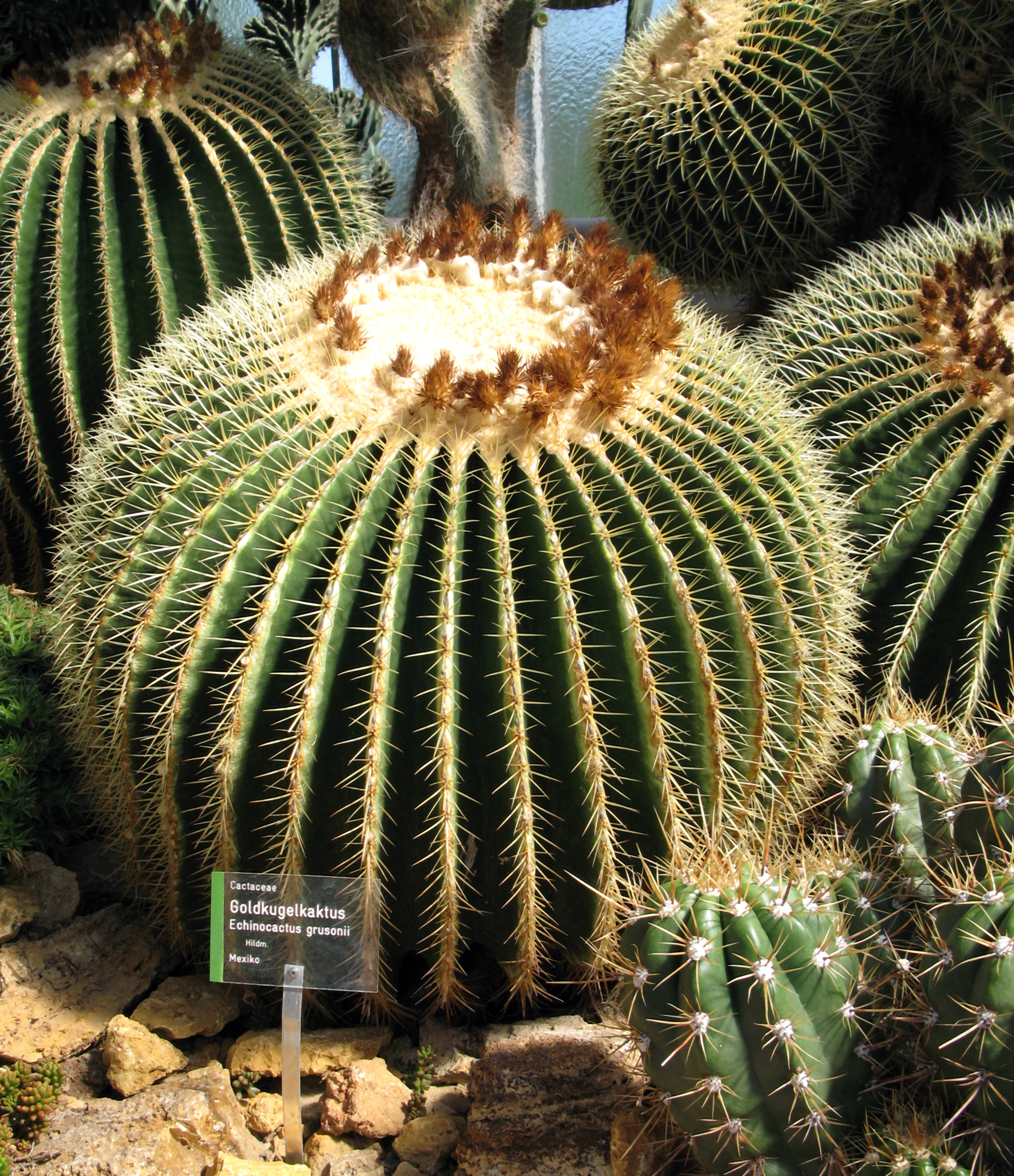 Cactaceae - Echinocactus grusonii - Goldkugelkaktus aus Mexiko, aufgenommen im Stuttgarter Zoo Wilhelma